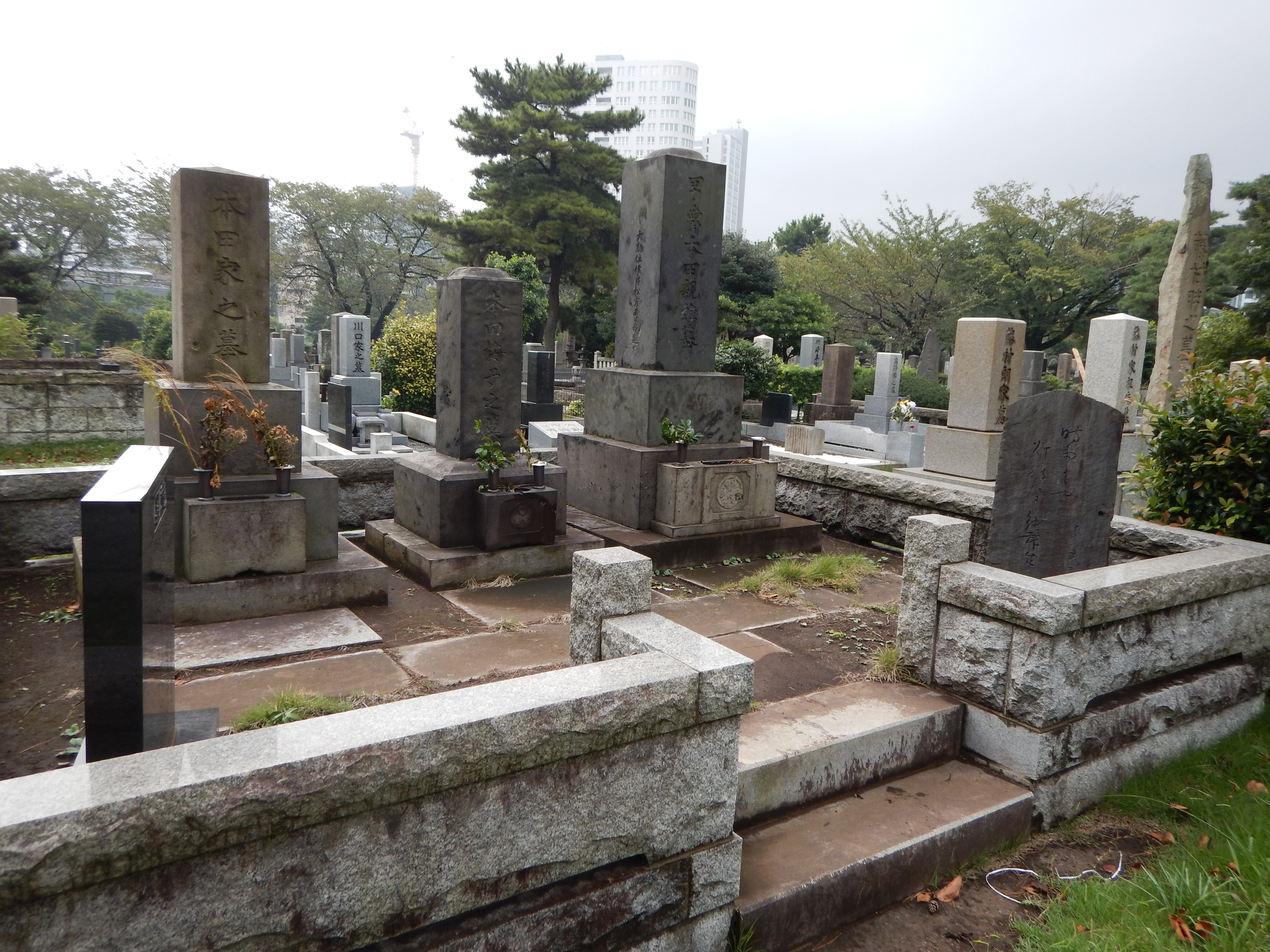 俳人本田あふひ等が眠る、東京・青山霊園にある本田家の墓